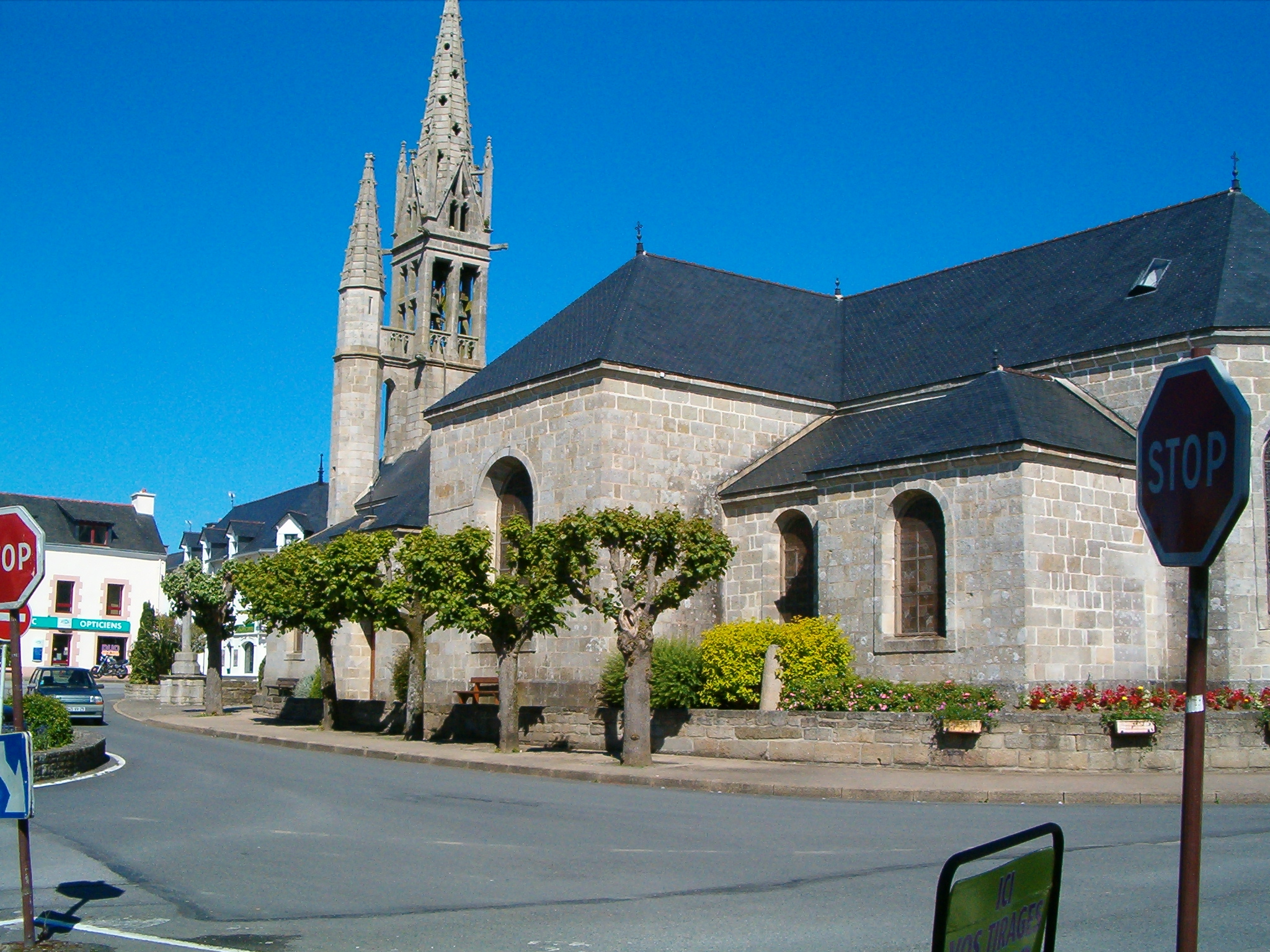 Eglise Saint-Pierre